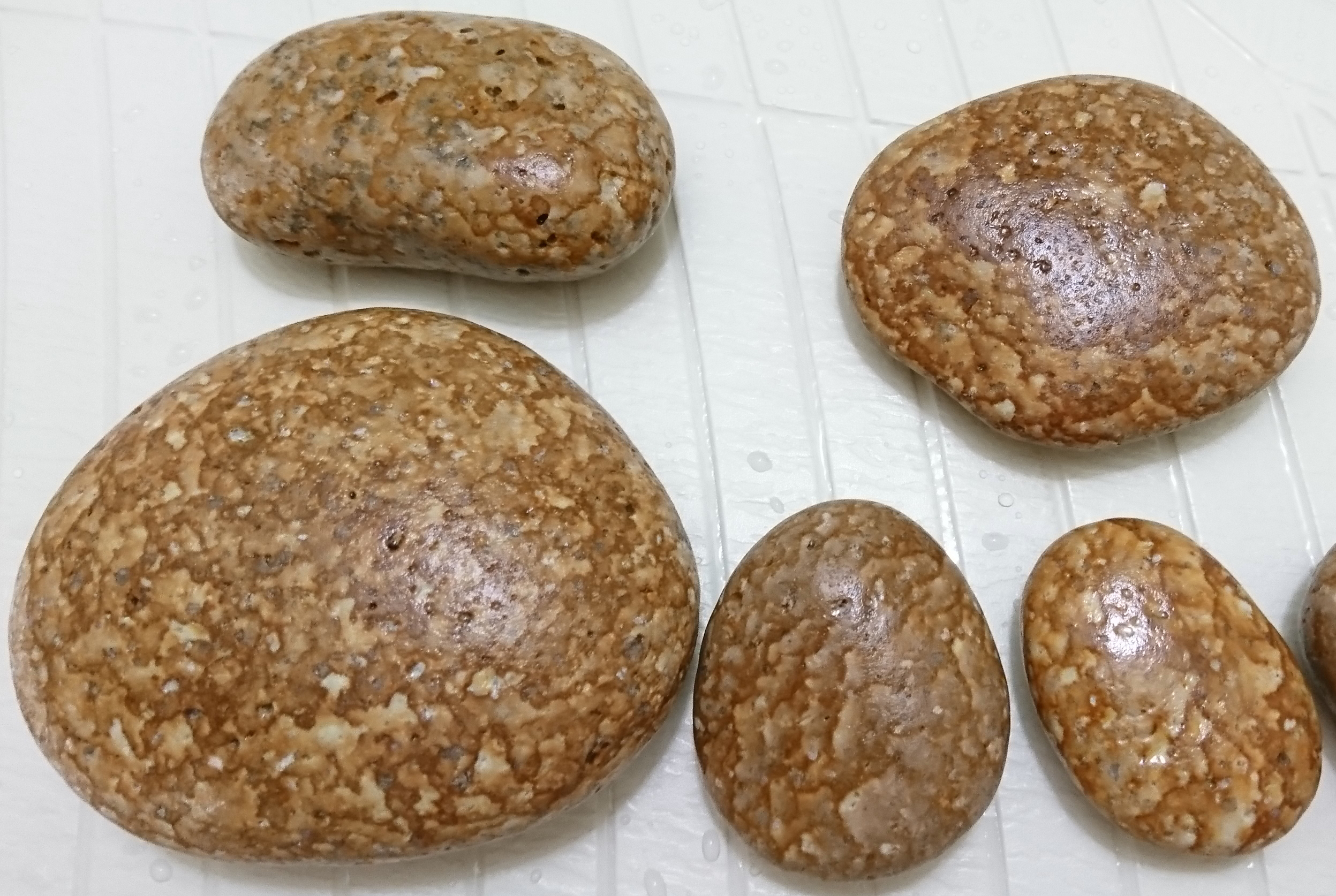 新潟県糸魚川市で採取された姫川薬石（石英斑岩）